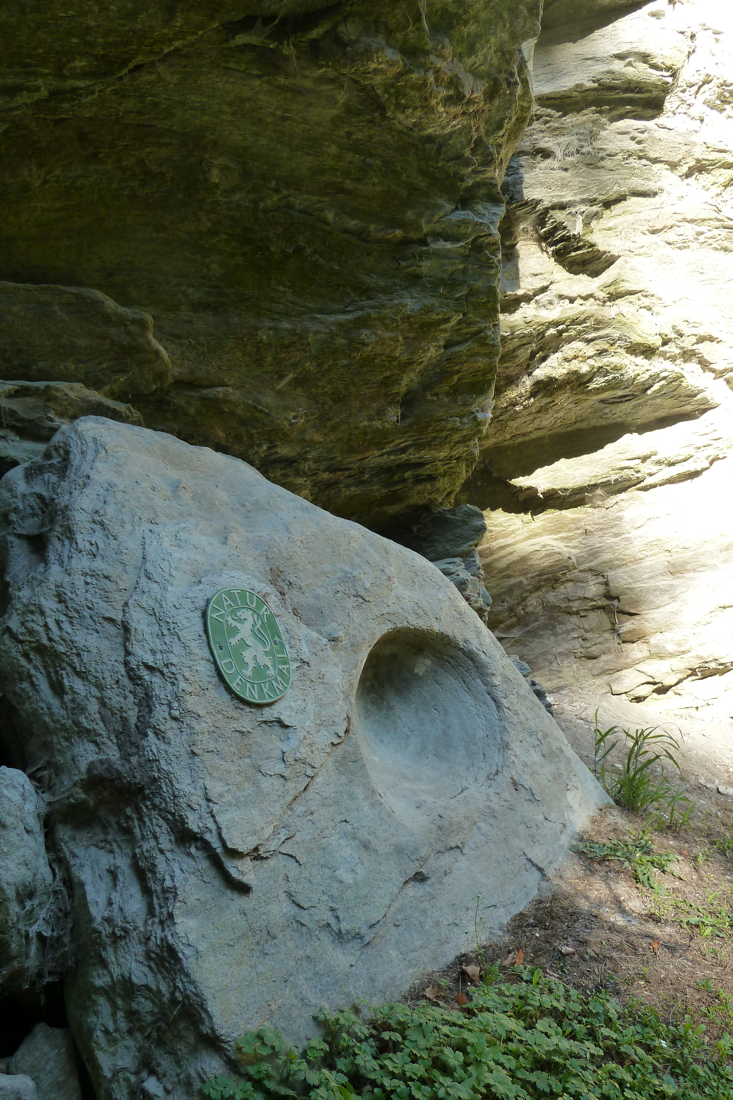 Gletschermühle Liesinger Toagschüssel This media shows the natural monument in Styria with the ID 828.